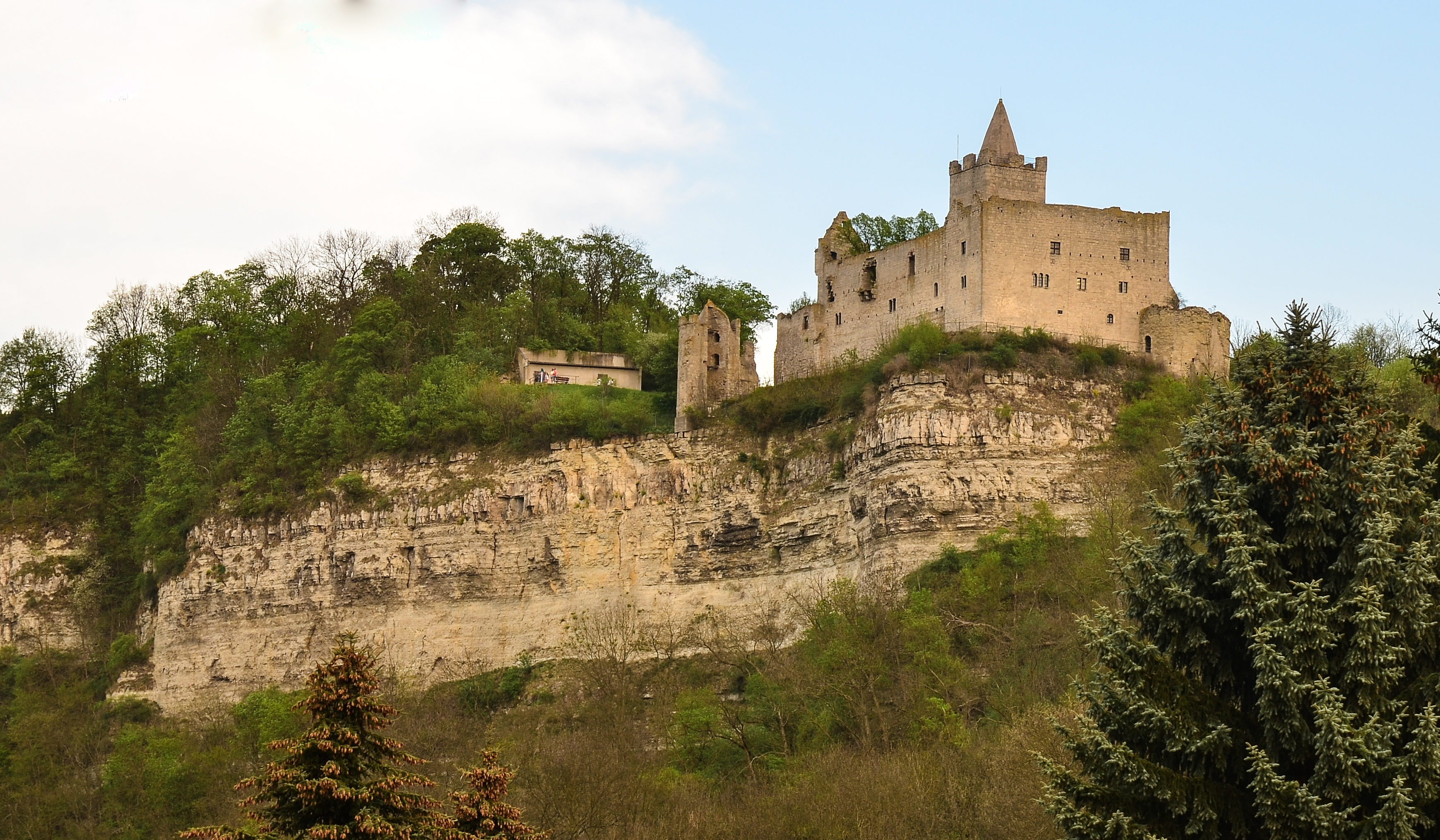 Bad Kösen Saaleck Rudelsburg